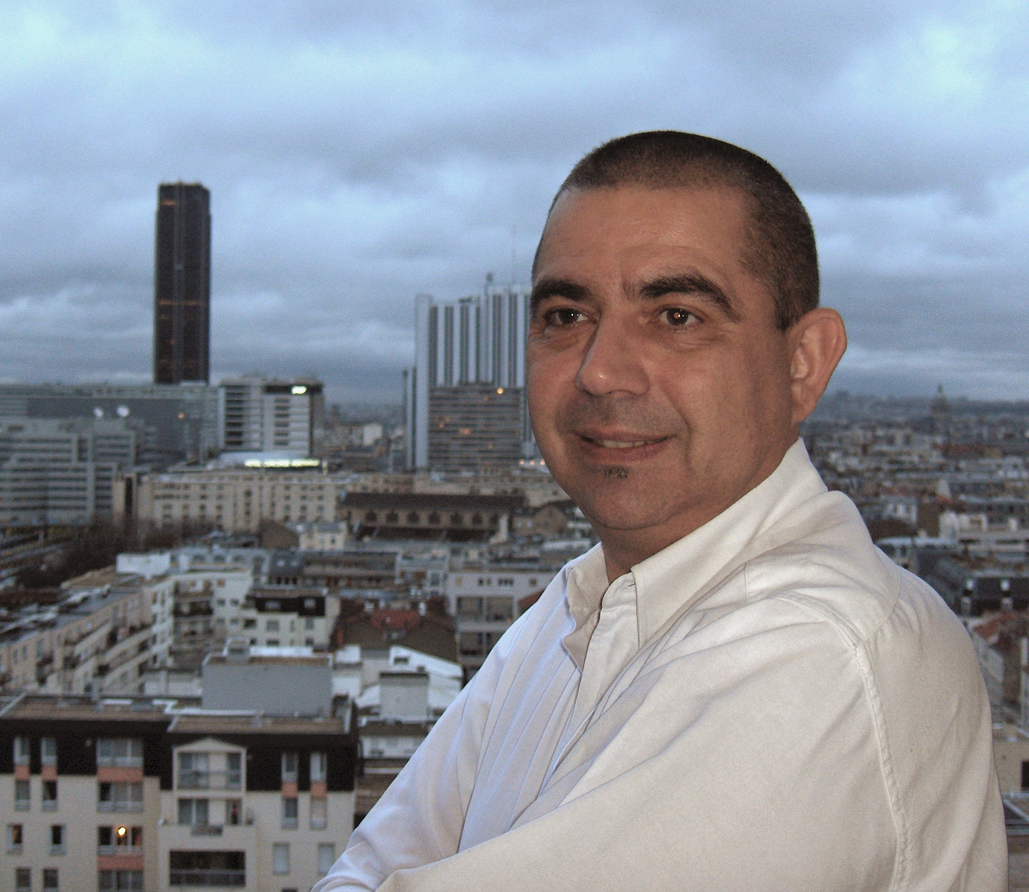 Portrait d'Olivier Delorme le 2 décembre 2007.